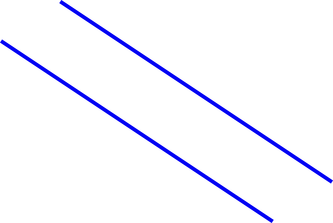 שני ישרים מקבילים